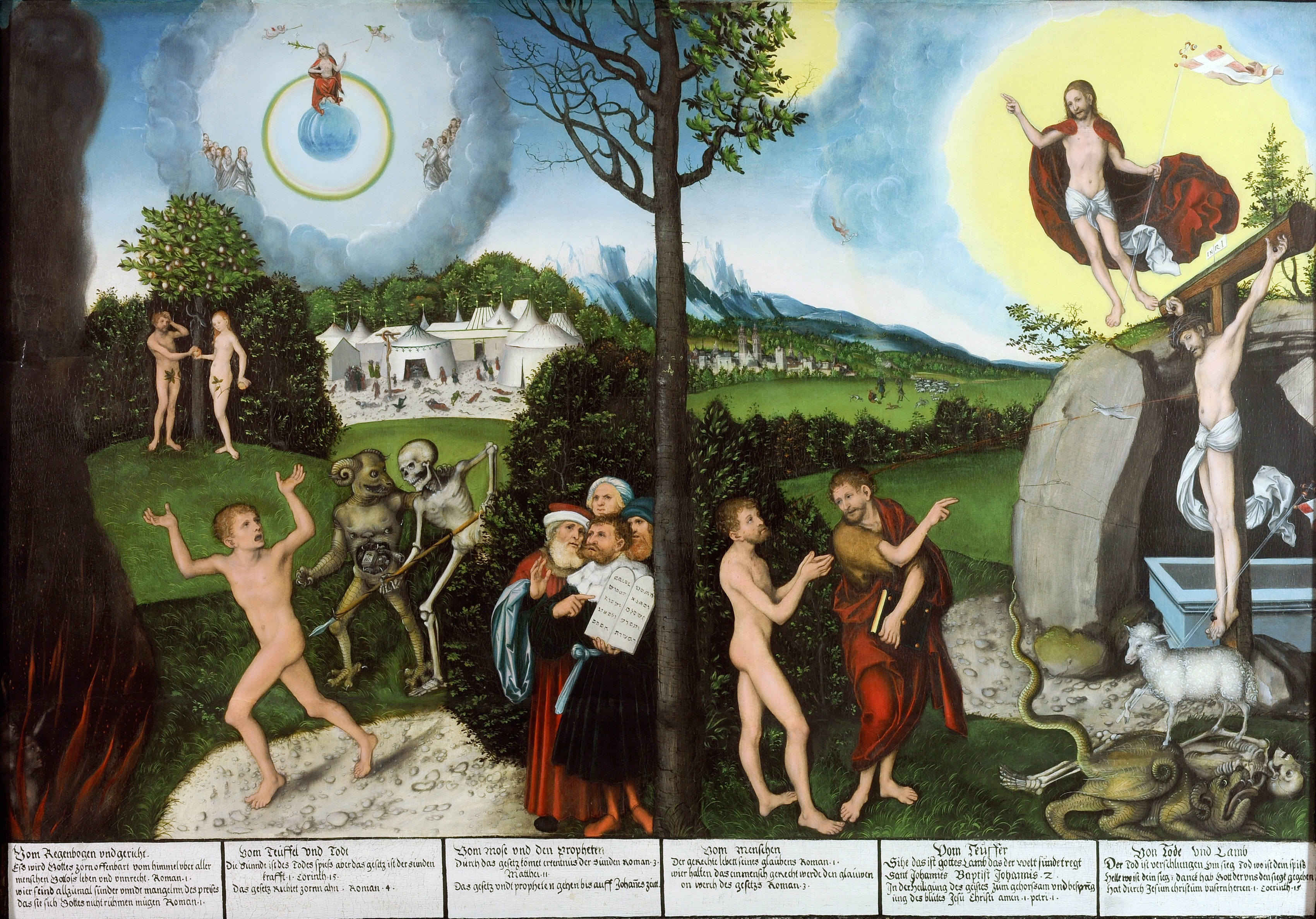 Gesetz und Gnade oder Verdammnis und Erlösung.